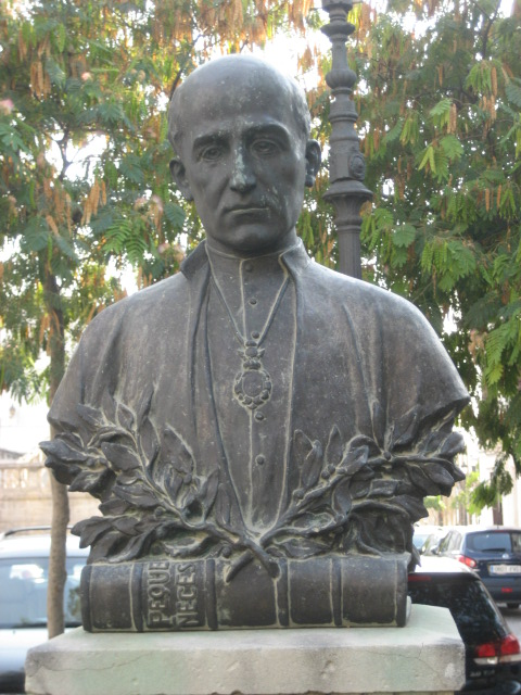 Monumento al Padre Luis Coloma en Jerez de la Frontera.